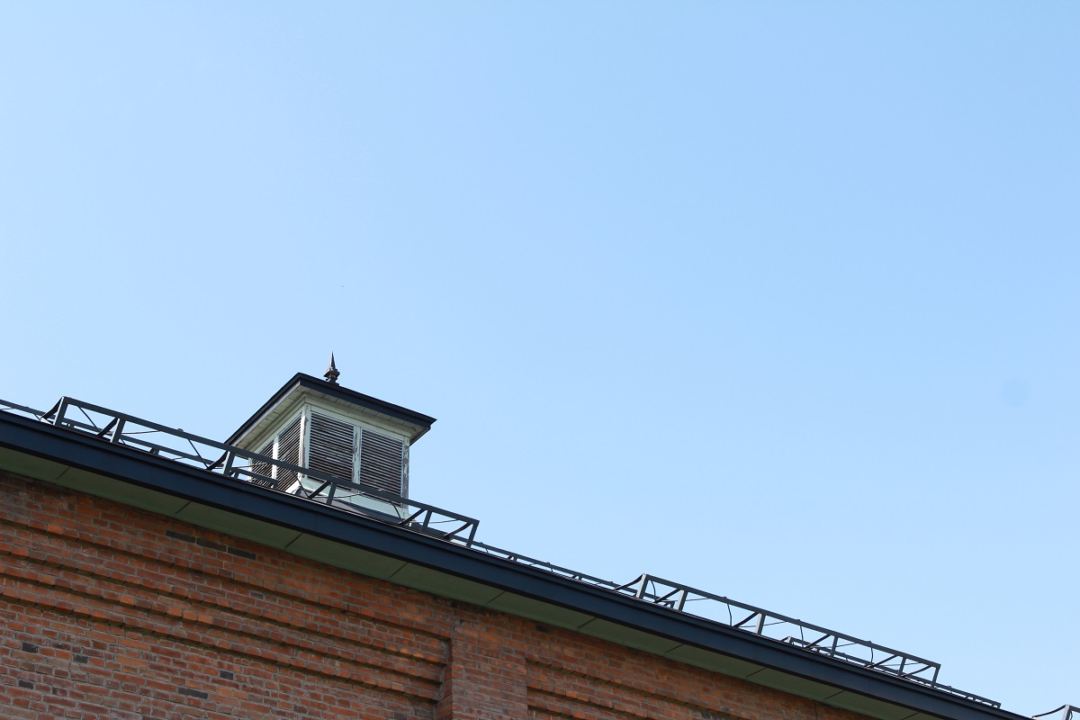 吉野町煉瓦倉庫外観、2017年9月13日撮影